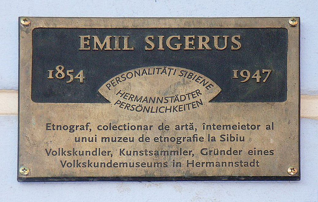 Zweisprachige Tafel in Sibiu-Hermannstadt über Emil Sigerus ("Volkskundler, Kunstsammler, Gründer eines Volkskundemuseums in Hermannstadt")